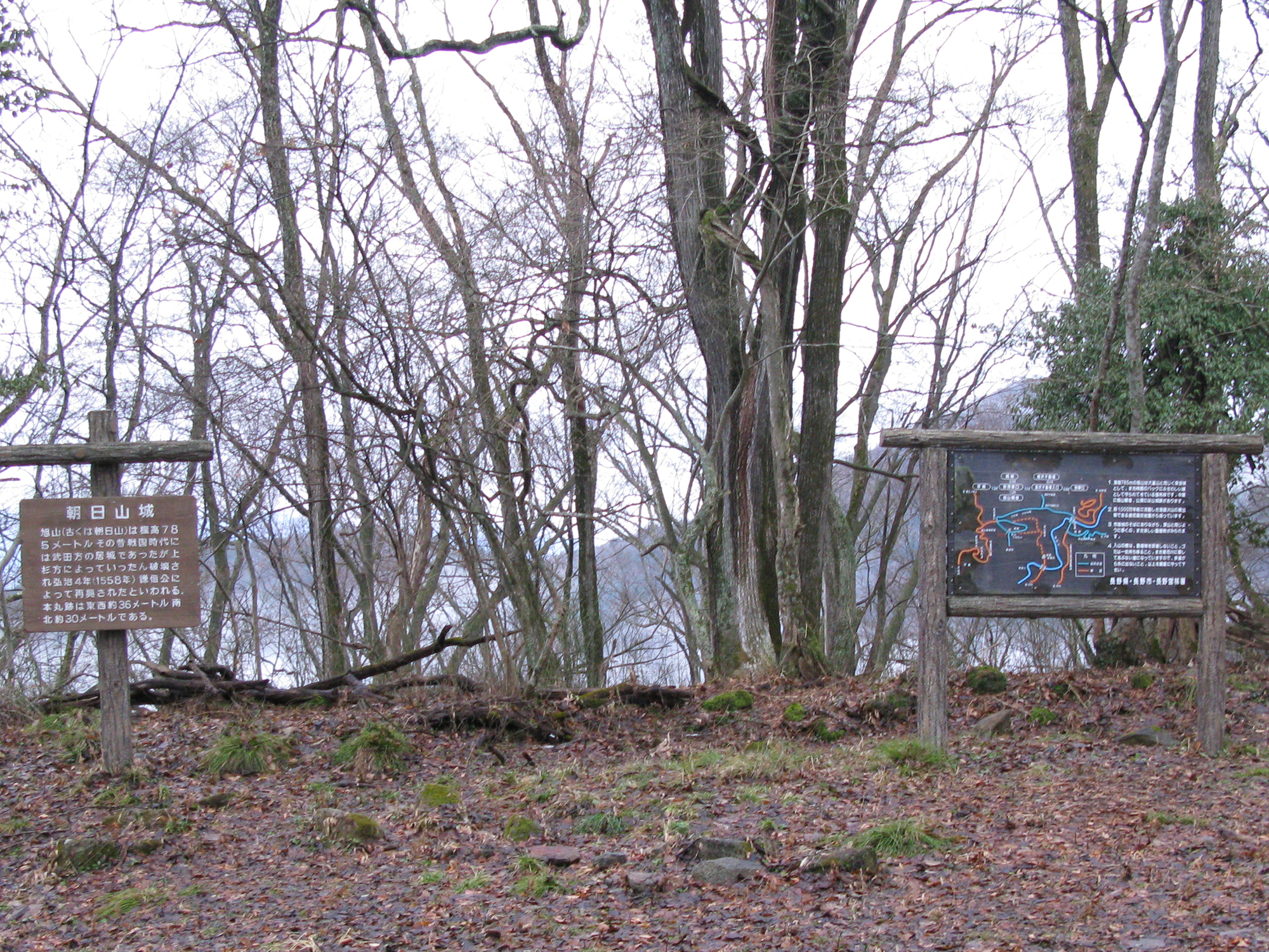 旭山城主郭部